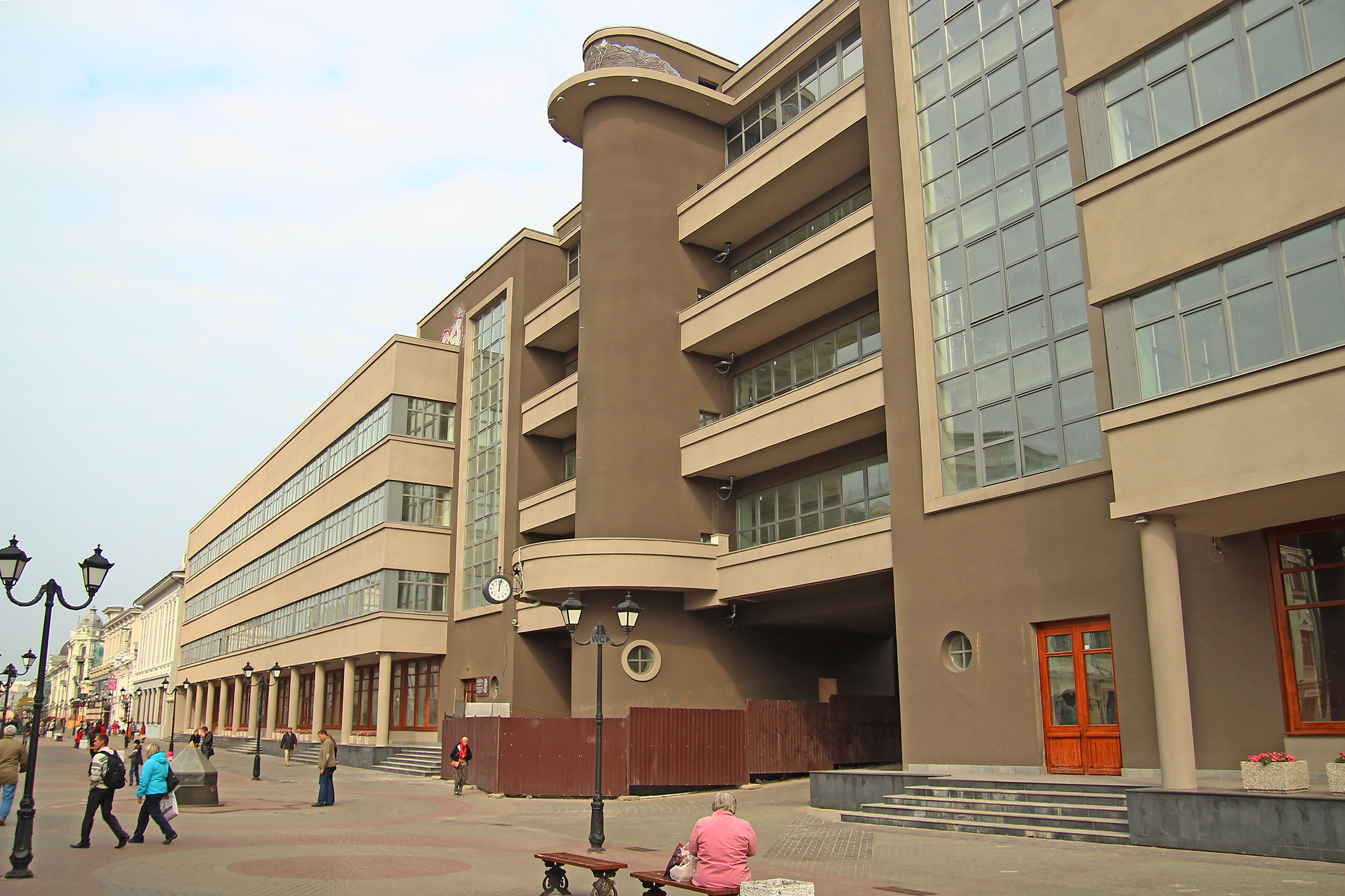 Дом печати (Республика Татарстан, Казань, баумана улица, 19)